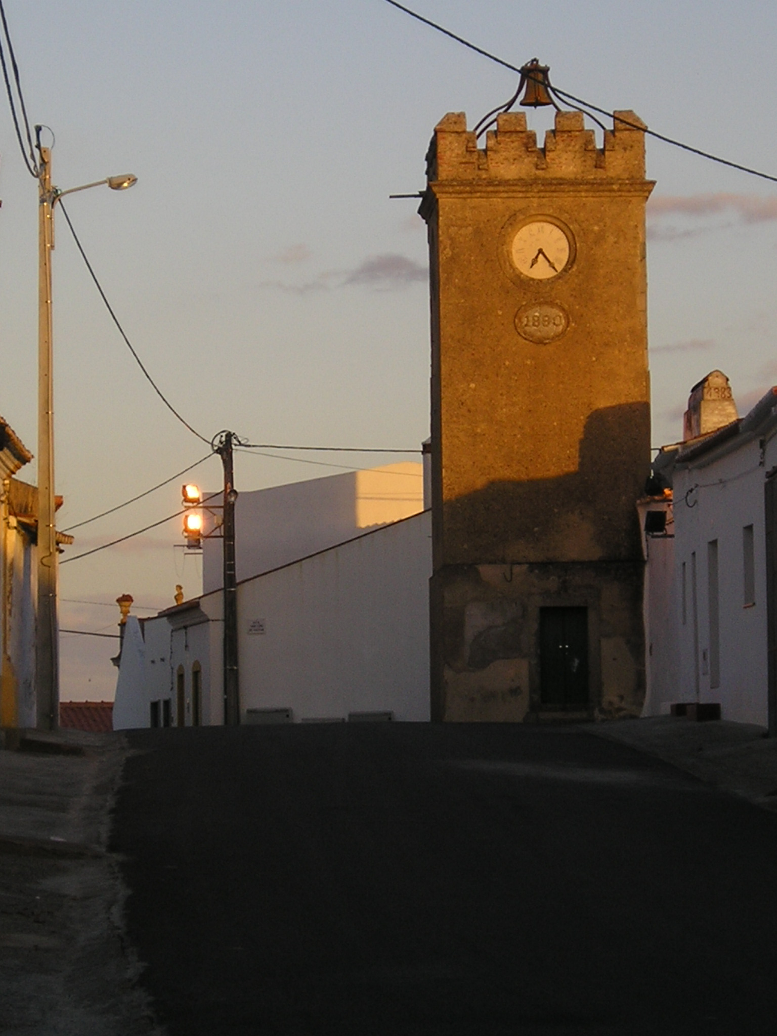 Descrição: (Foto da torre do Relogio de Vila de Frades) Fonte e créditos: Foto tirada por Faisco Licença